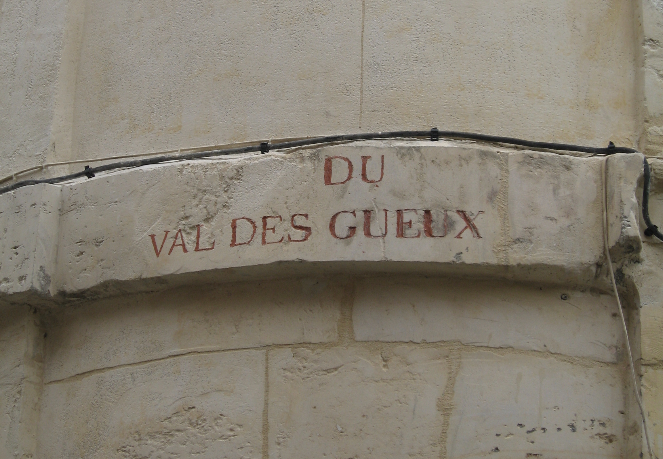 Ancien nom de la rue du Vaugueux à Caen, gravée dans une pierre à l'angle de la rue du Vaugeux et de la rue Porte au Berger